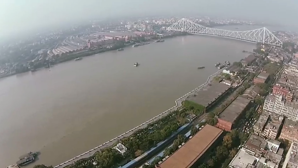 কলকাতা শহর হুগলি নদীর তীরে